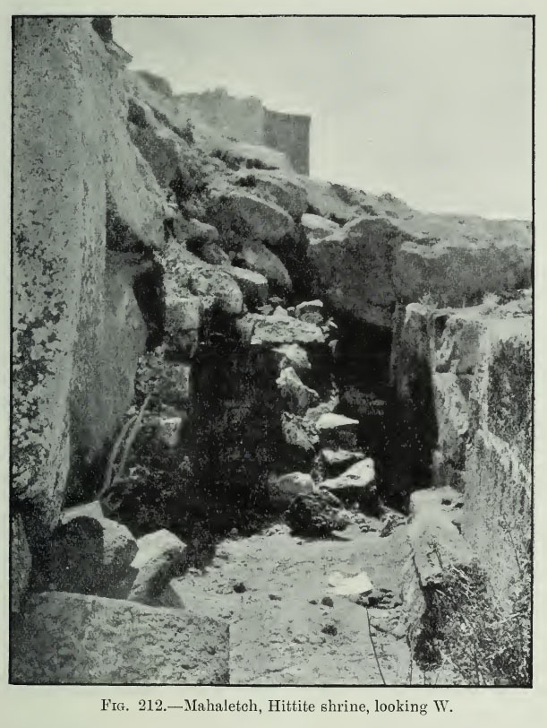 Korridor mit zwei hethitischen Inschriften auf dem Karadağ, Provinz Karaman, Südtürkei, Photo von Gertrude Bell 1909